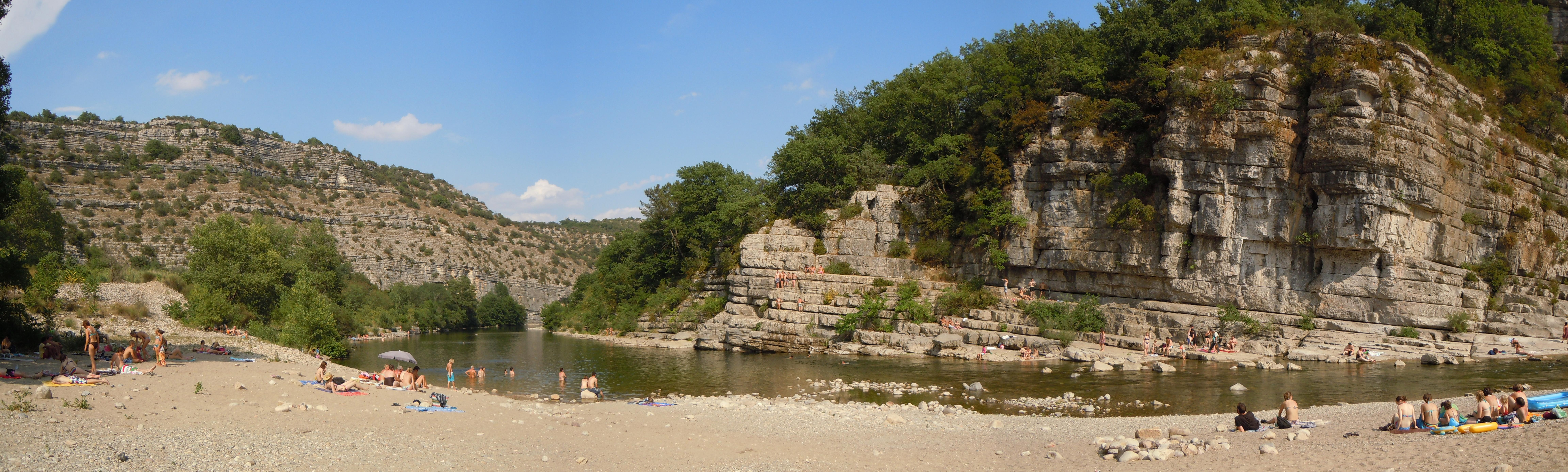 Gorges du Chassezac - Ardèche France